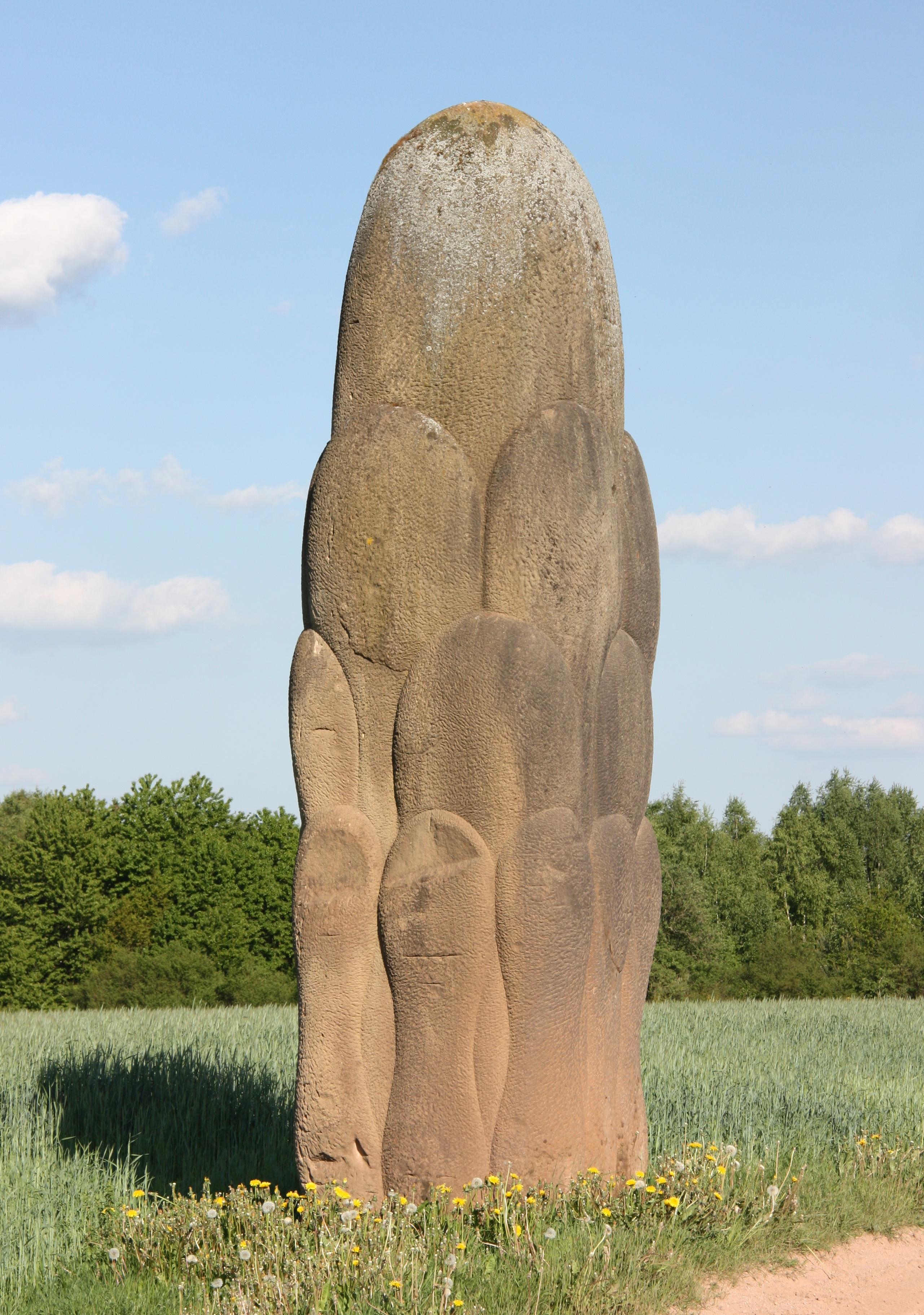 Der „Wolkenstein“ des Bildhauers Franz Xaver Ölzant an der Straße der Skulpturen.